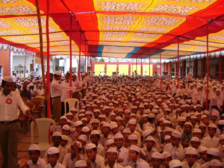 ربانی اسکول